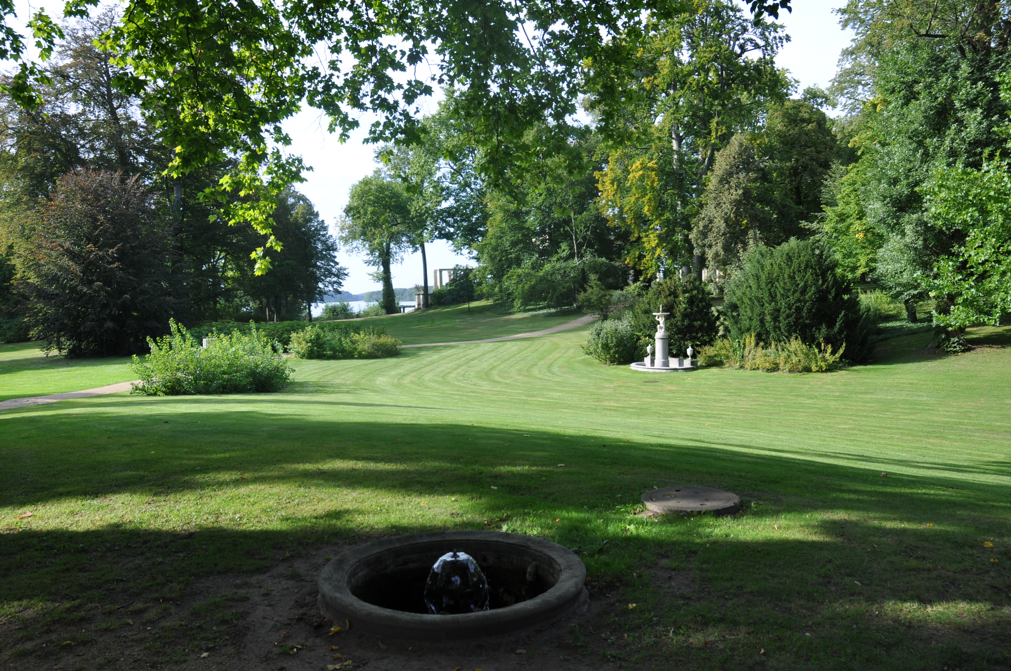 Pleasureground Klein-Glienicke 2012